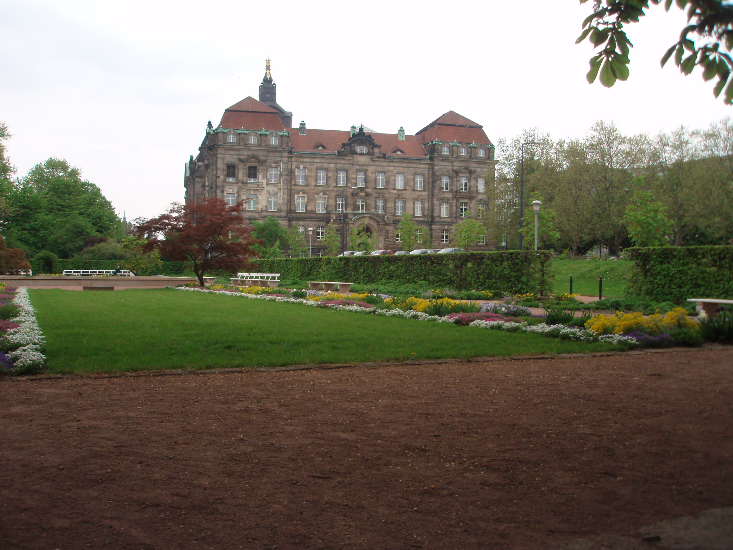 Staatskanzlei